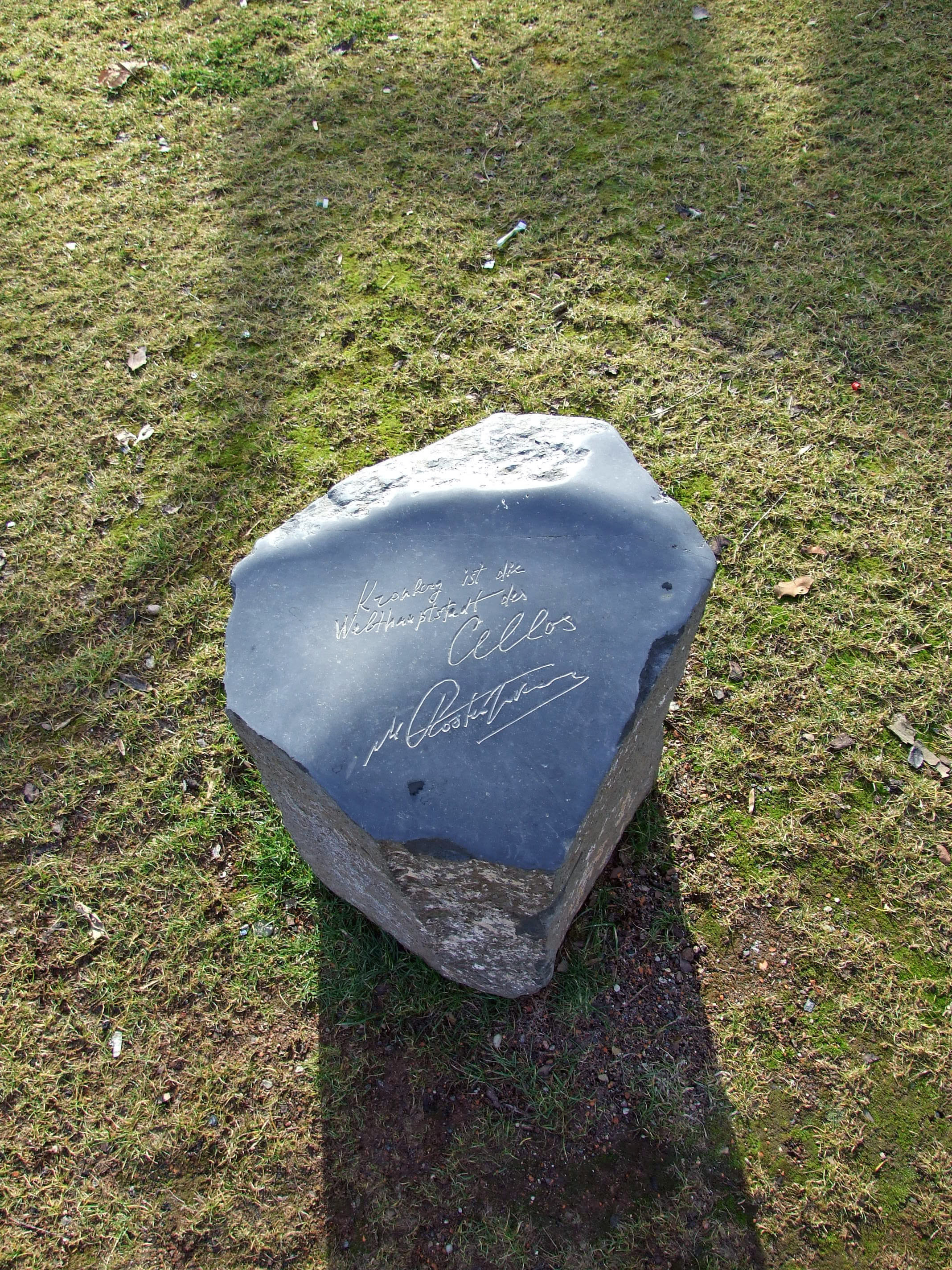 Rostropowitsch-Denkmal (Detail) im „Schulgarten“ in Kronberg